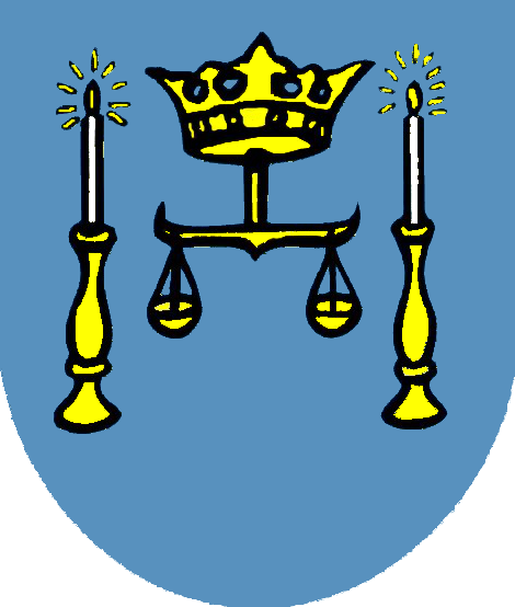 Herb Mazańcowic w powiecie bielskim, gminie Jasienica